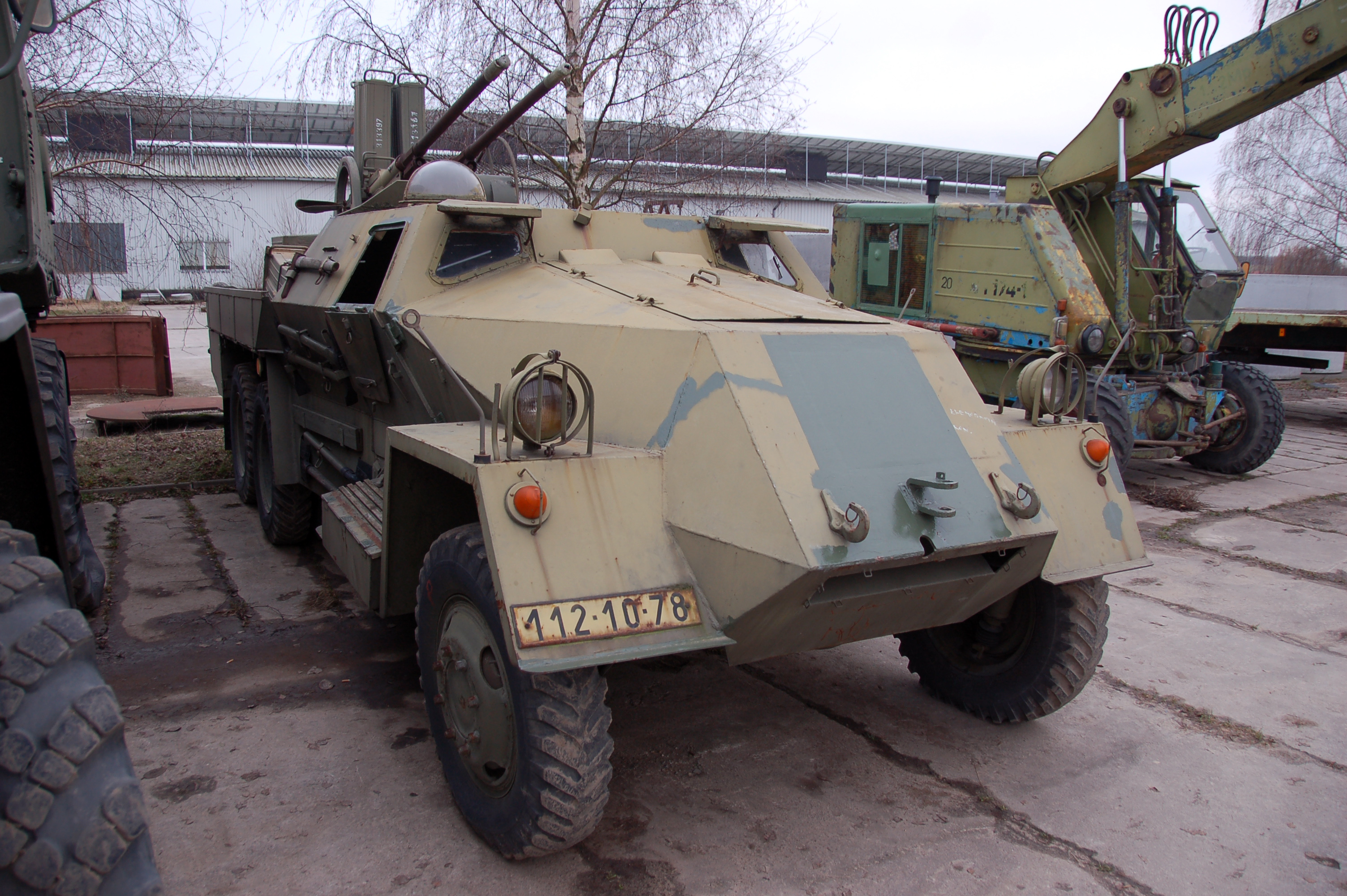 Technikpark MV in Grimmen